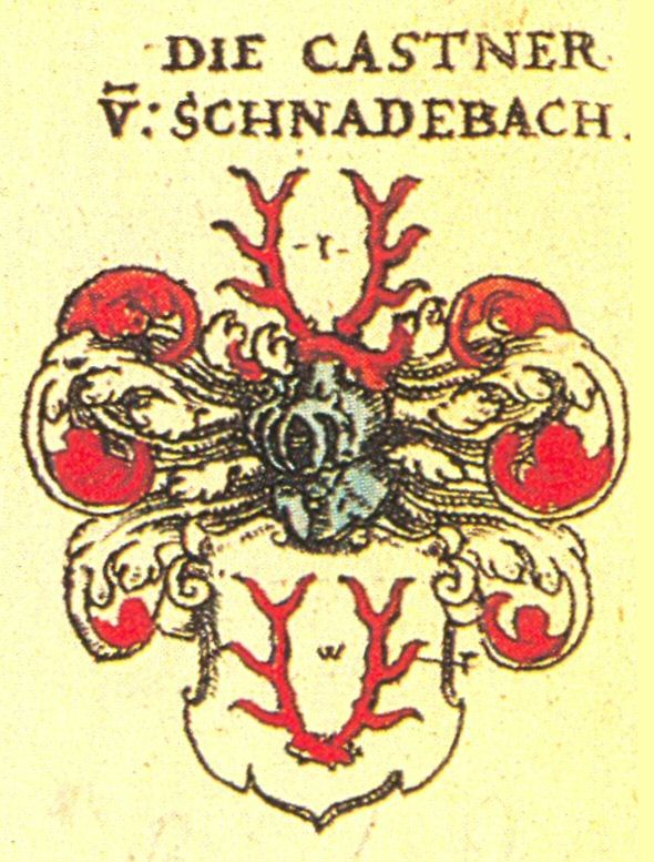 Wappen der Bayerischen Adelsfamilie Castner von Schnadebach eingescannt aus: Horst Appuhn (Hrsg.), Johann Siebmachers Wappenbuch. Die bibliophilen Taschenbücher 538, 2. verb. Aufl , Dortmund 1989 Bayerische Blatt 99